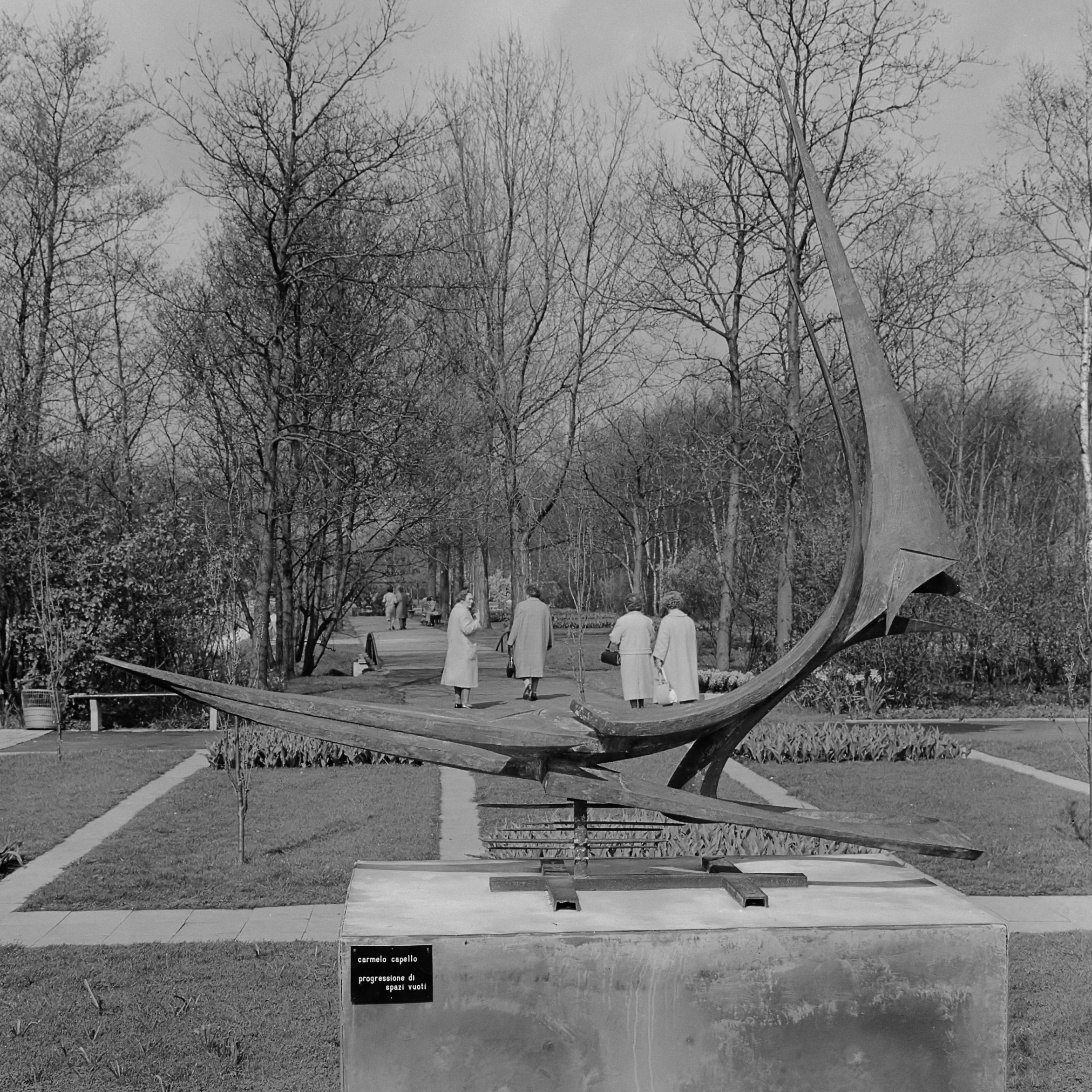 Keukenhof 1964, beeldende kunst Italiaanse inzending van Camelo Capello , "Progressione di Spazie vuoti" 20 april 1964